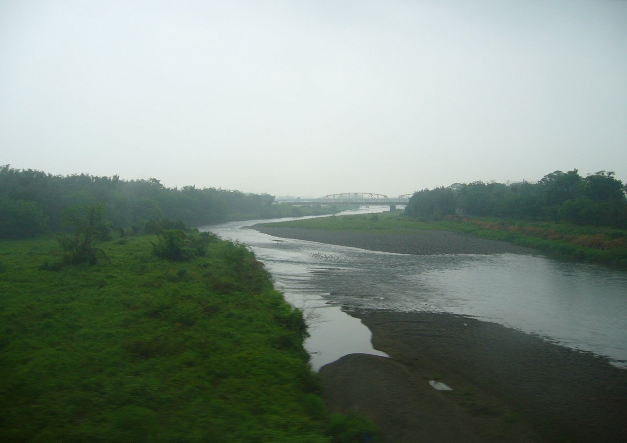 安曇川 湖西線車窓（安曇川駅～新旭駅）から東望